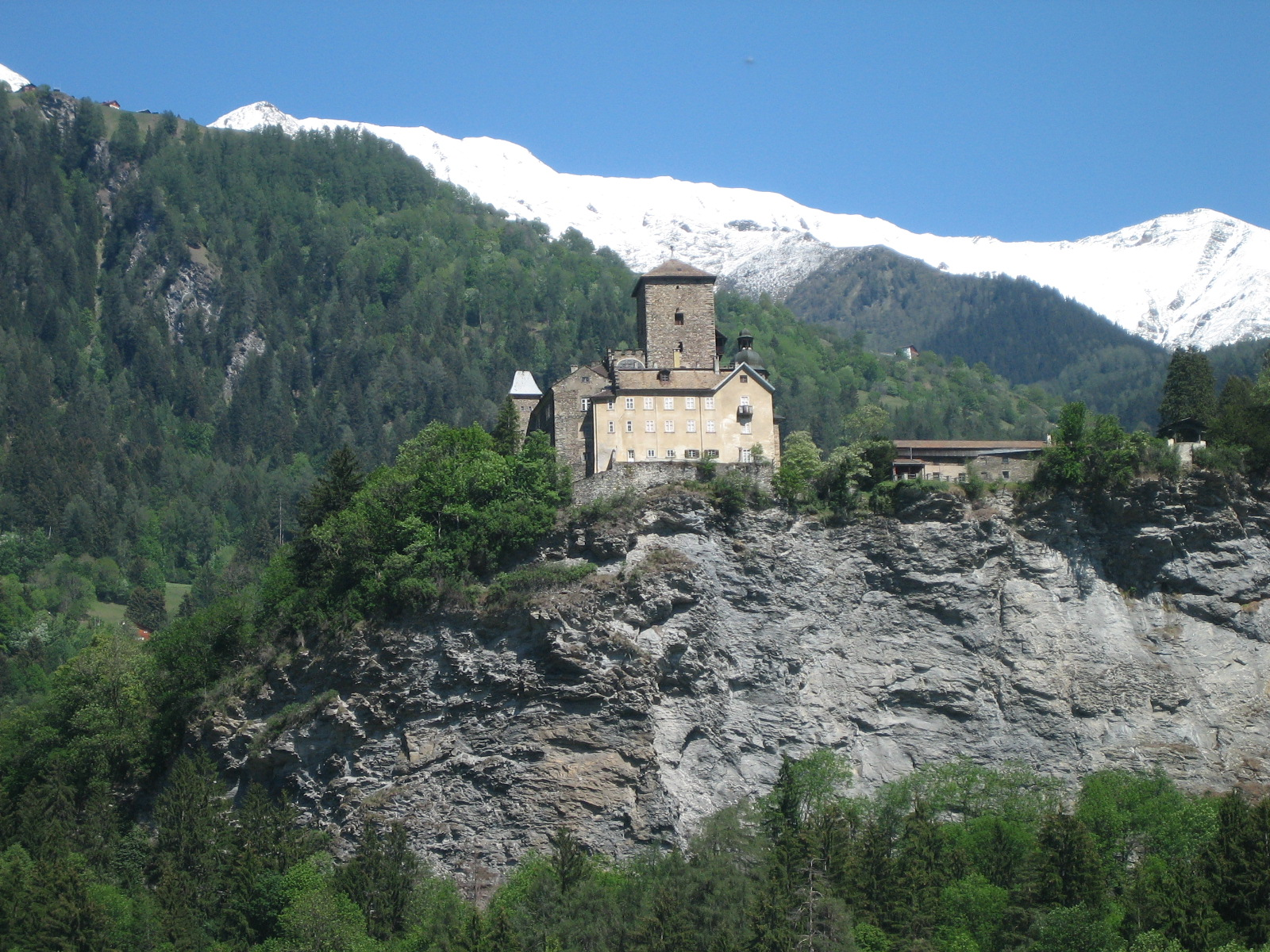 Schloss Ortenstein von Westen